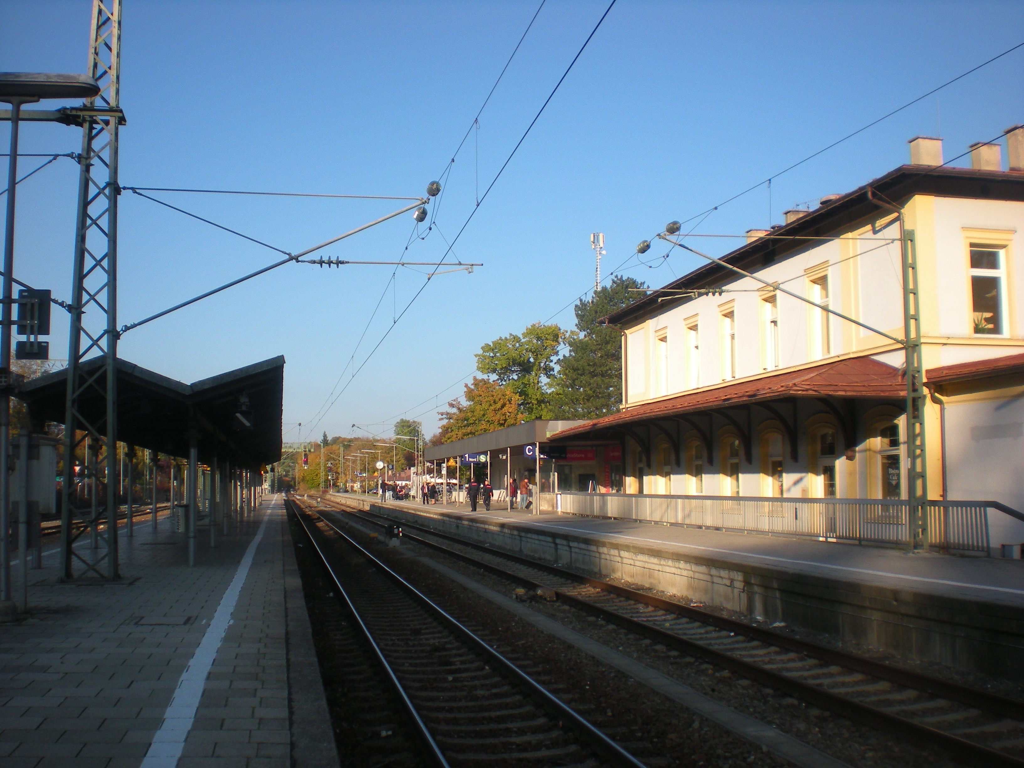 Bahnsteige des Bahnhofs Tutzing